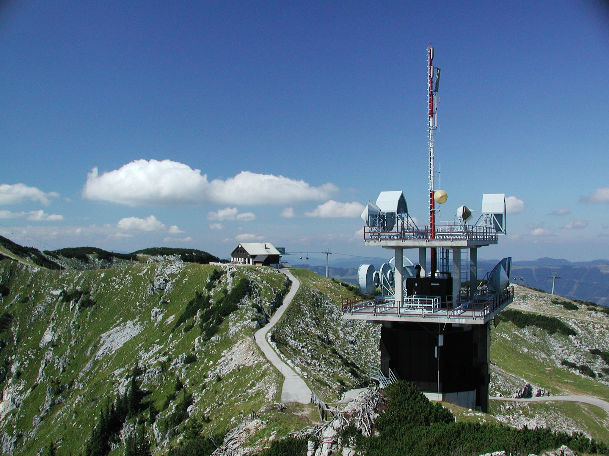 en: Telekom Austria Radio tower on Hochkar mountain in the Göstlinger Alps in Lower Austria de: Richtfunkstation der Telekom Austria auf dem Hochkar in den Göstlinger Alpen in Niederösterreich